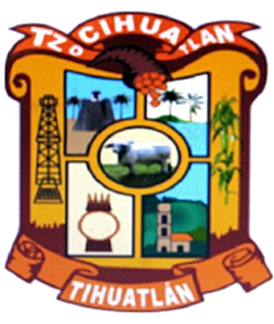 Escudo de armas del municipio veracruzano de Tihuatlán.